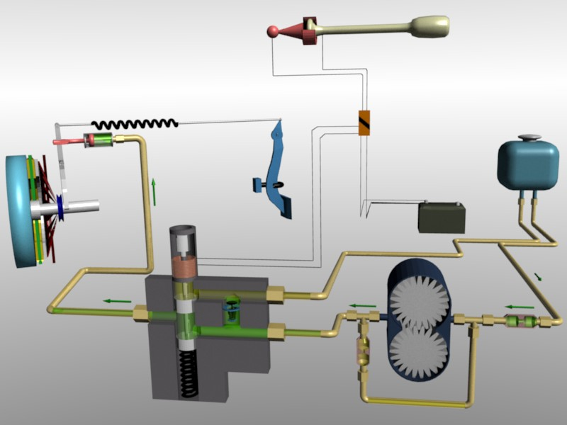 Einkuppelvorgang beim Hycomat 3D